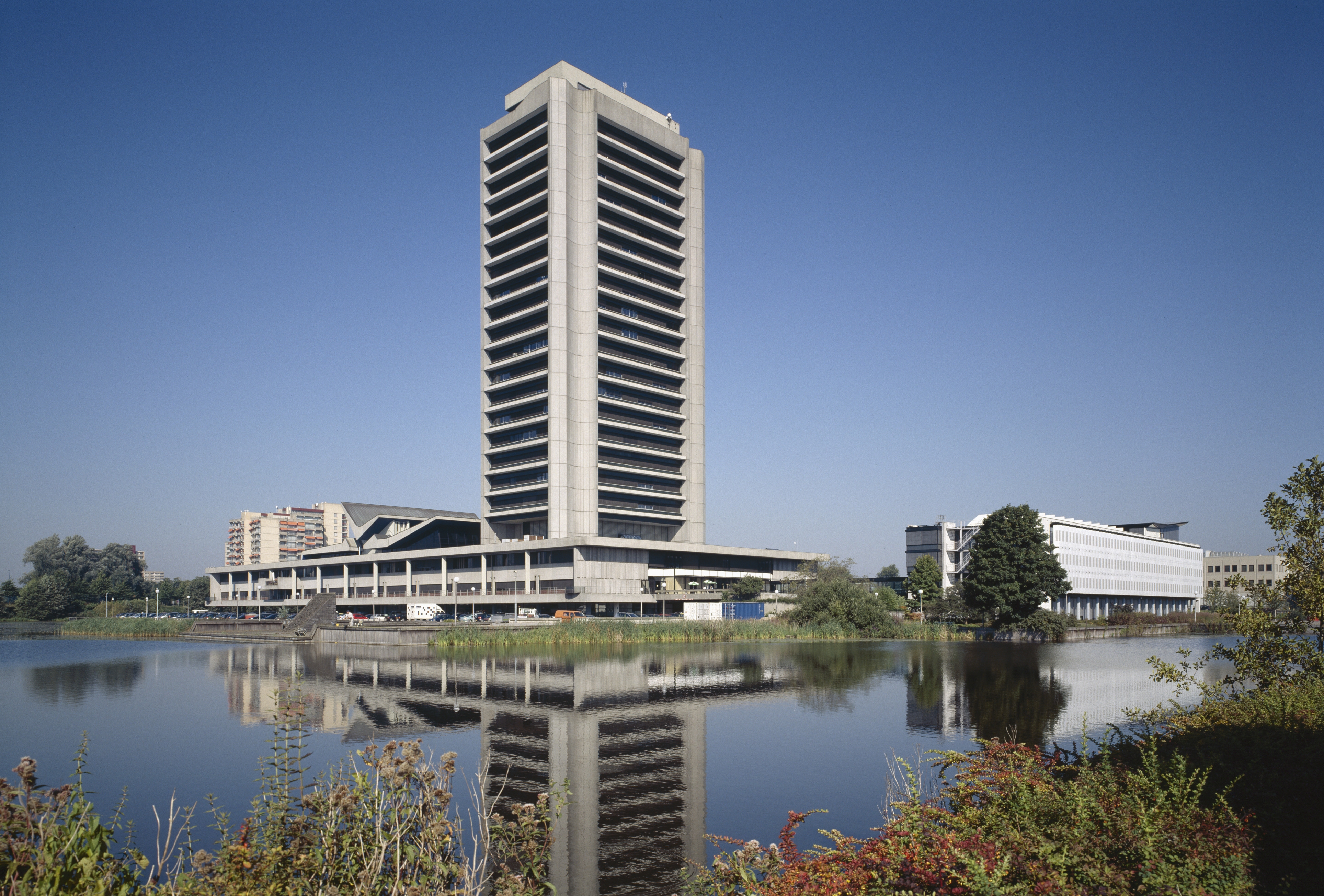 Provinciehuis: Overzicht, vijver op de voorgrond